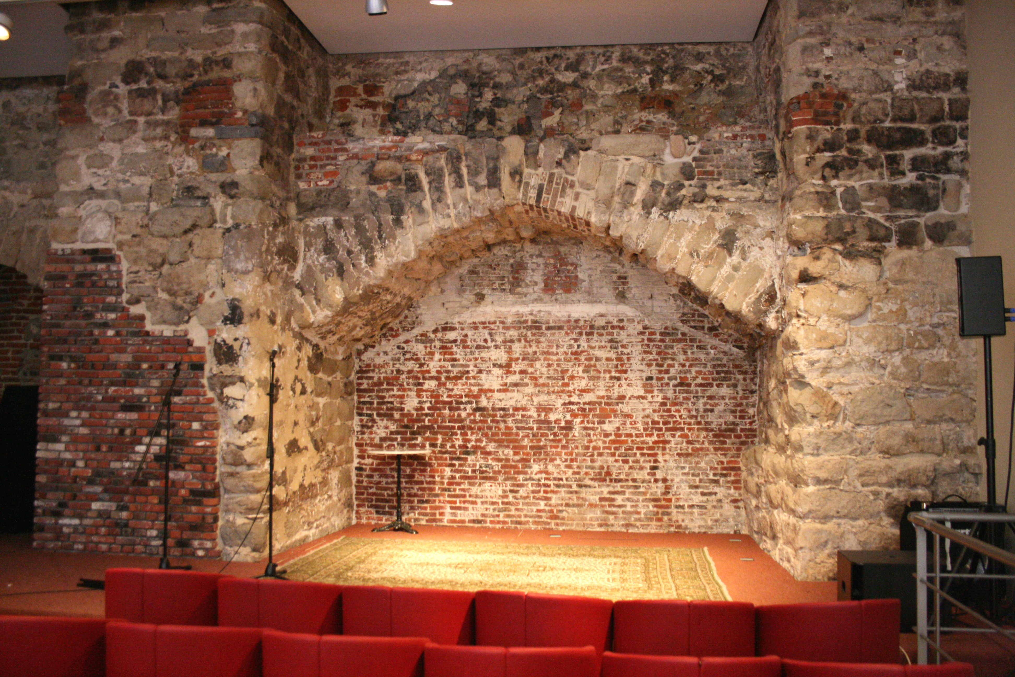 Treurenberg 10, Bruxelles (Belgique. Actuel Centre culturel hongrois. Restes de la première enceinte de Bruxelles